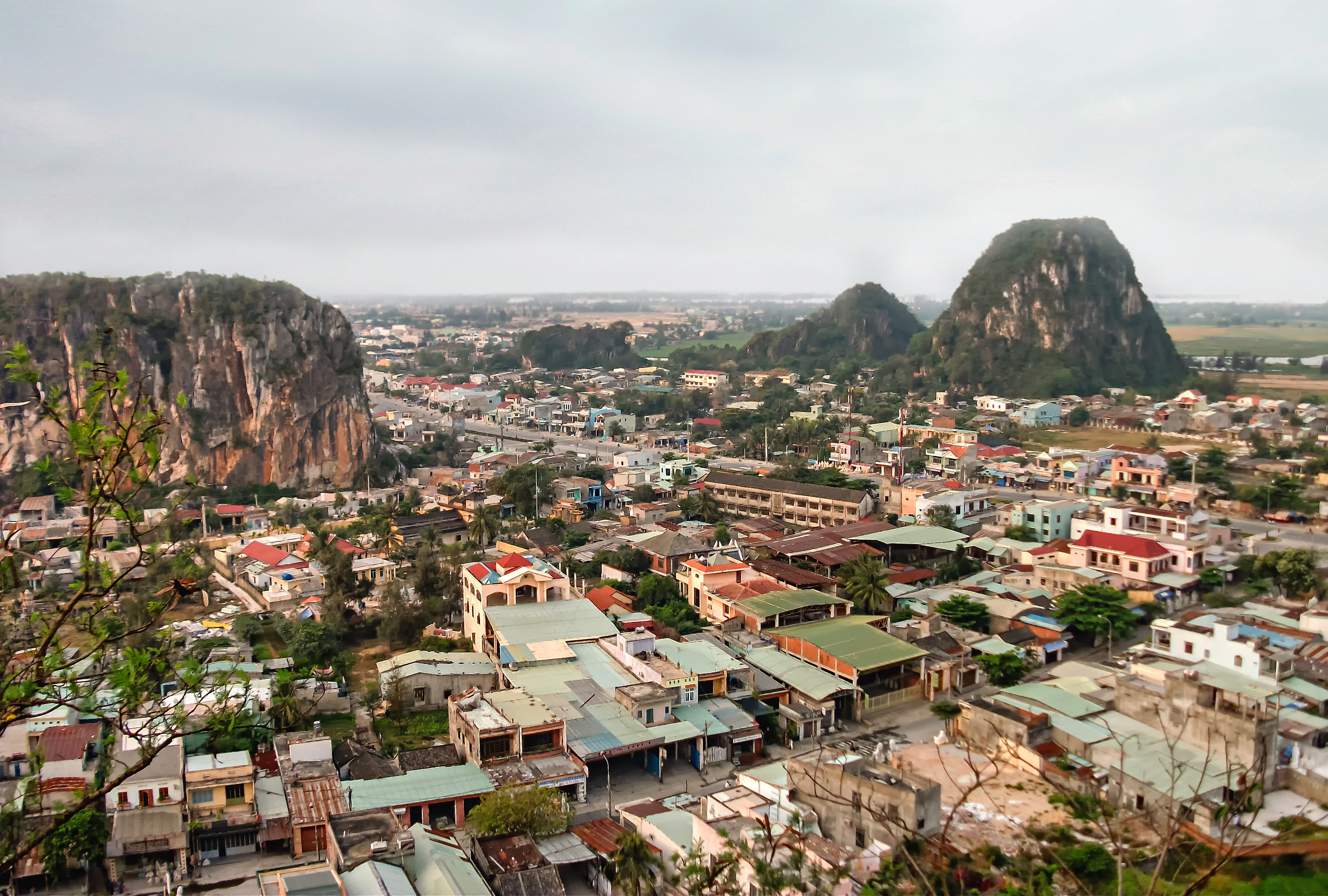 Từ trên đỉnh Thủy Sơn trong Ngũ Hành Sơn, nhìn thấy một phần phong cảnh thuộc quận Ngũ Hành Sơn, TP Đà Nẵng, Việt Nam.